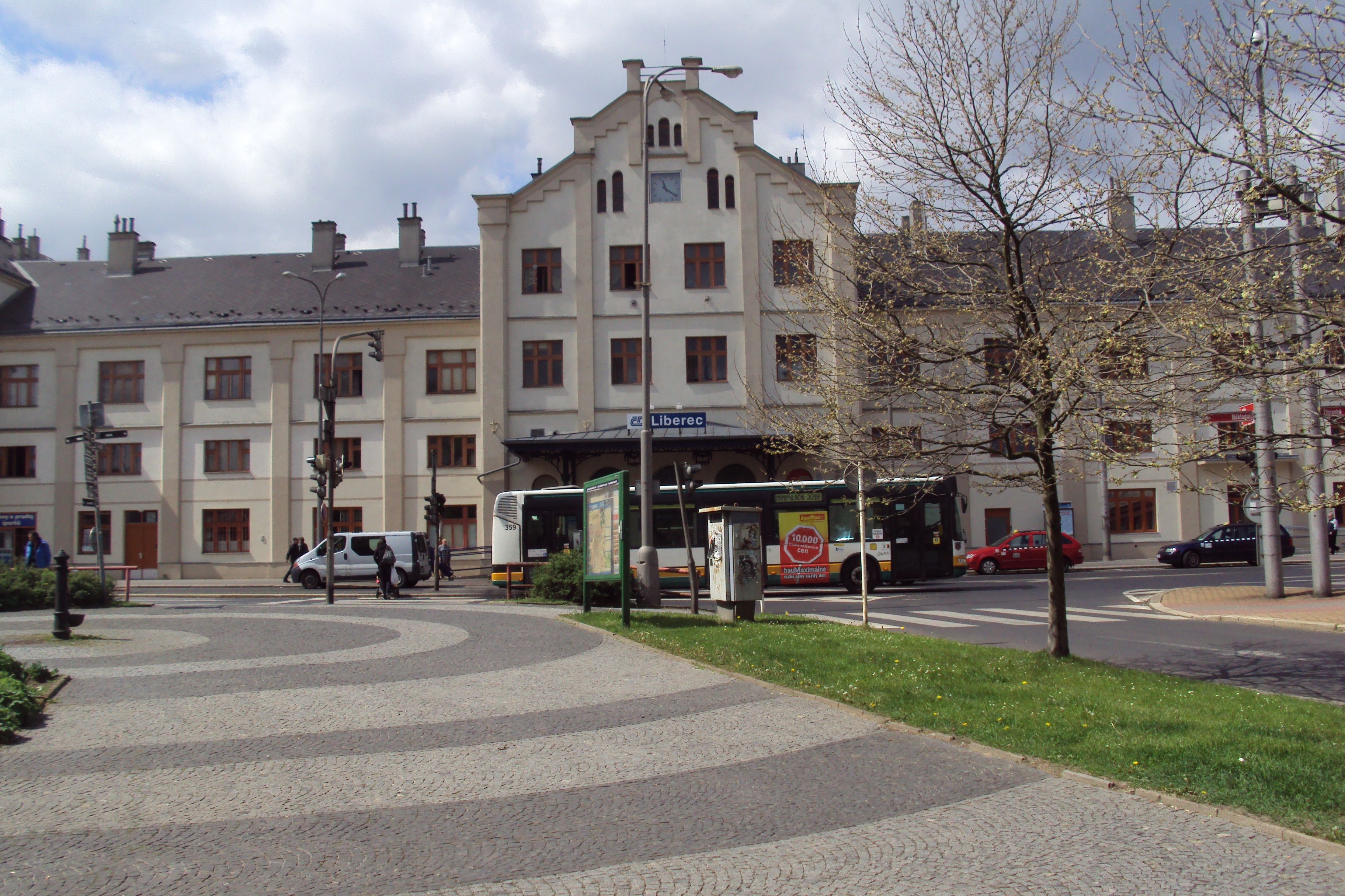 Hlavní vlakové nádraží v Liberci zvenčí